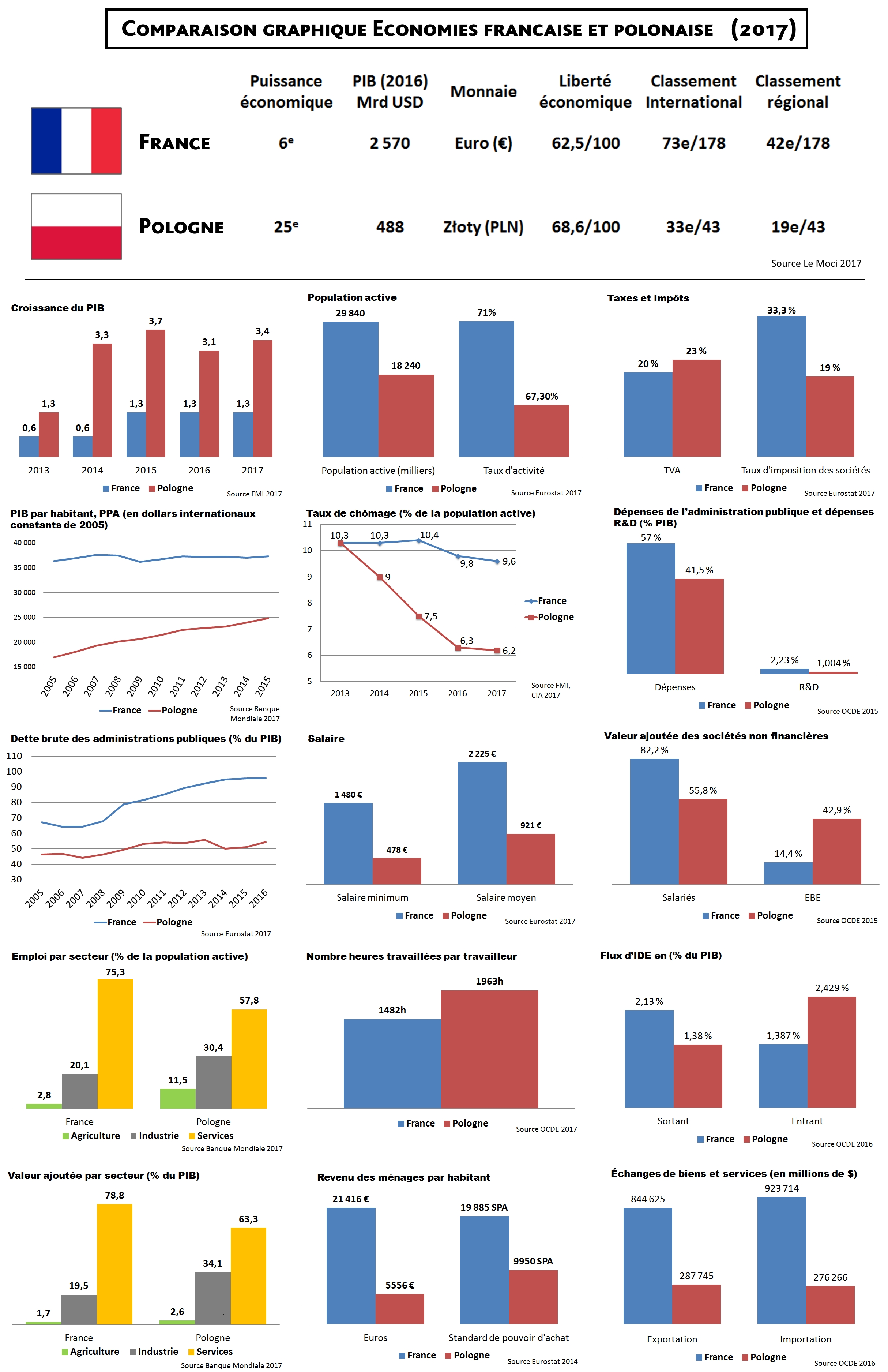 Regroupement de différents graphiques (de sources économiques) représentant les différents agrégats économiques utiles aux comparaisons macro-économiques.